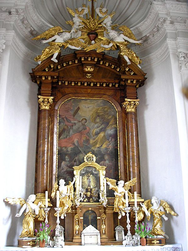 Wallfahrtskapelle Maria Alber (Friedberg, Landkreis Aichach-Friedberg, Bayerisch-Schwaben). Der Altar (um 1700). Eigene Aufnahme, März 2007 / Pilgrimage chapel Maria Alber near Friedberg (Bavaria, Germany). The altar (ca. 1700). Own photo, March 2007